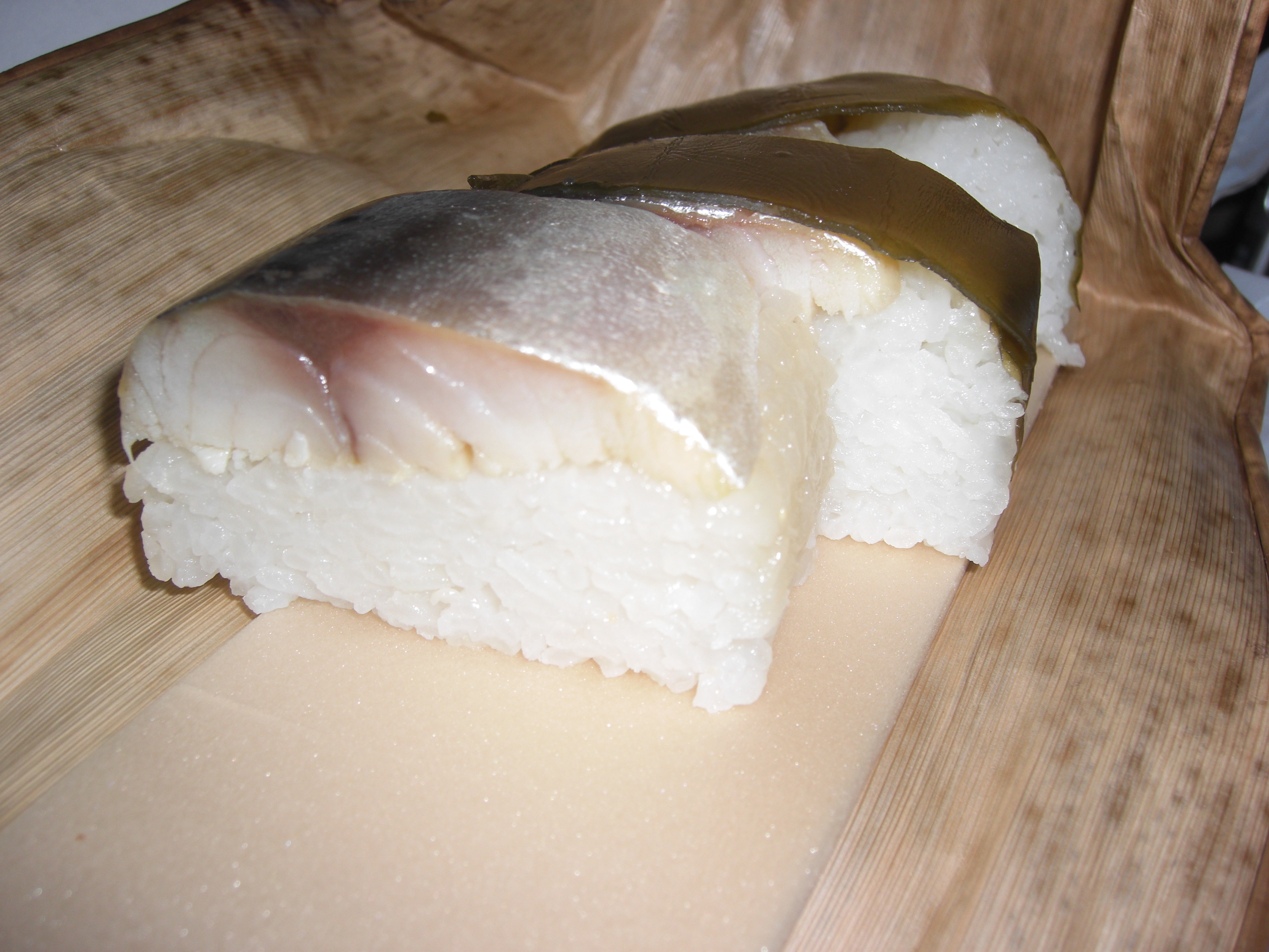 鯖寿司 奥の2つの上に載っているのはこんぶ